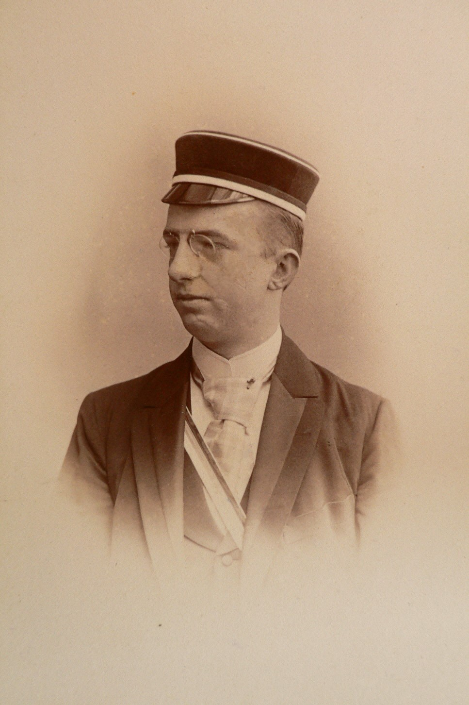 Porträtfotografie von Emil Philippi.